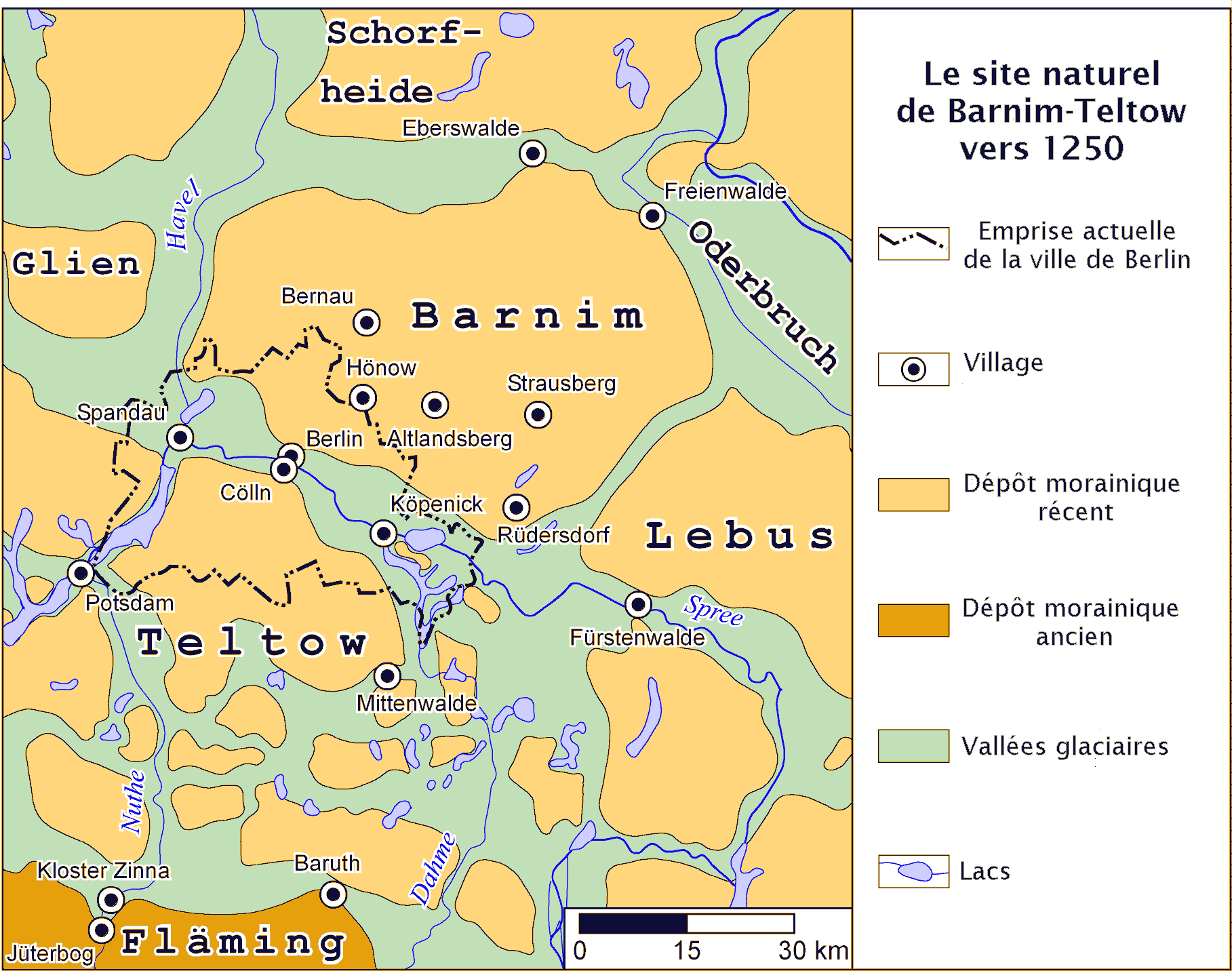 Site naturel de la région de Berlin vers 1250